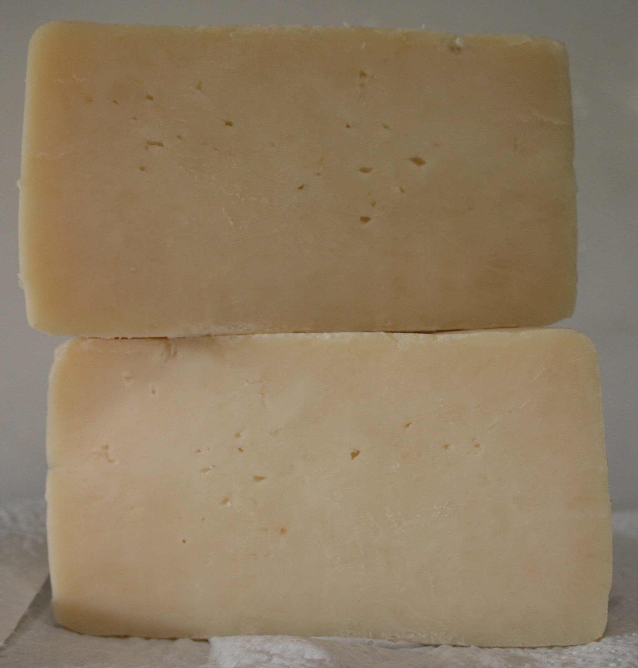 Queso Ovín de Oveja cortado